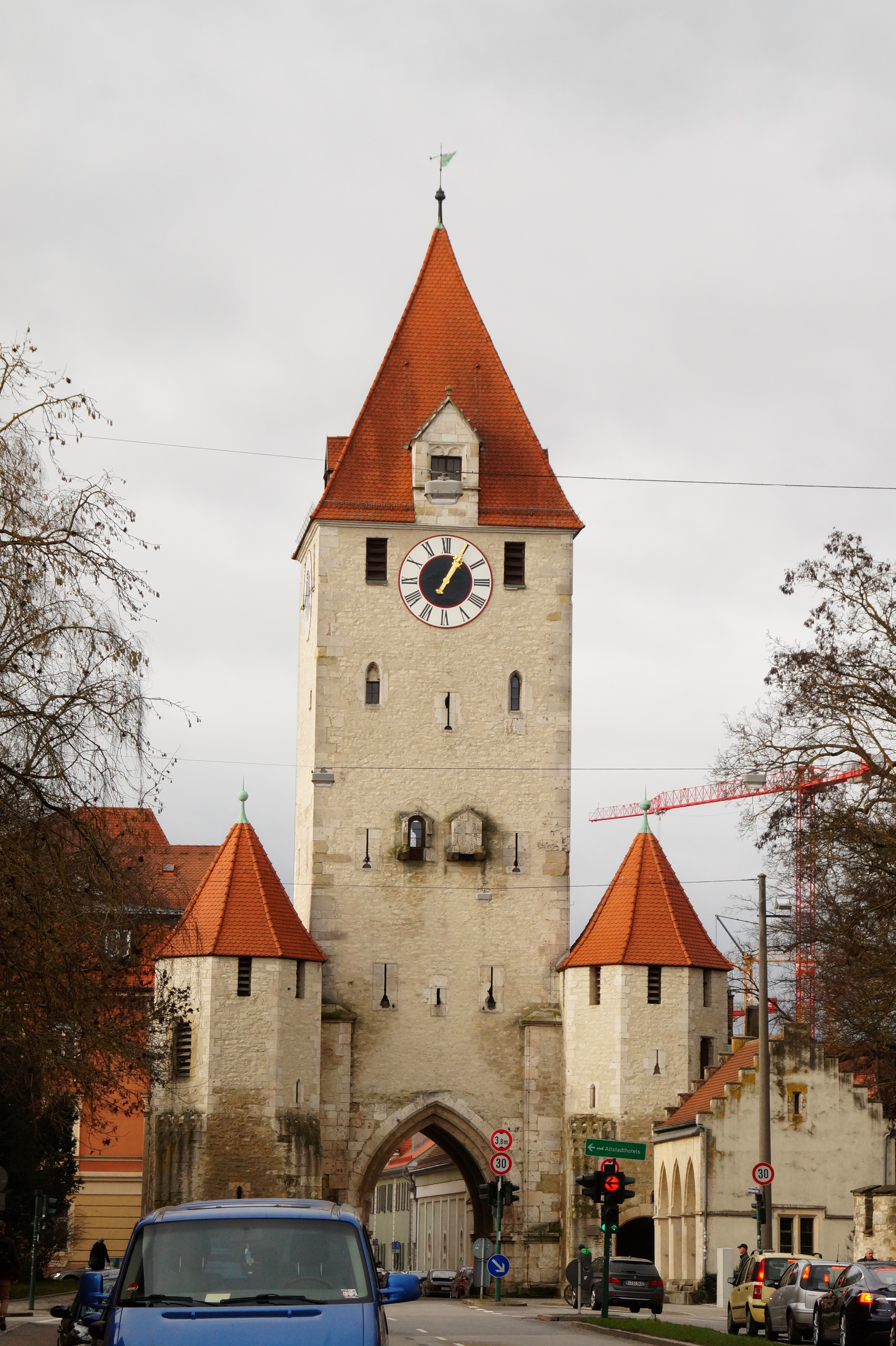 Regensburg Ostentor mit Torwachthaus